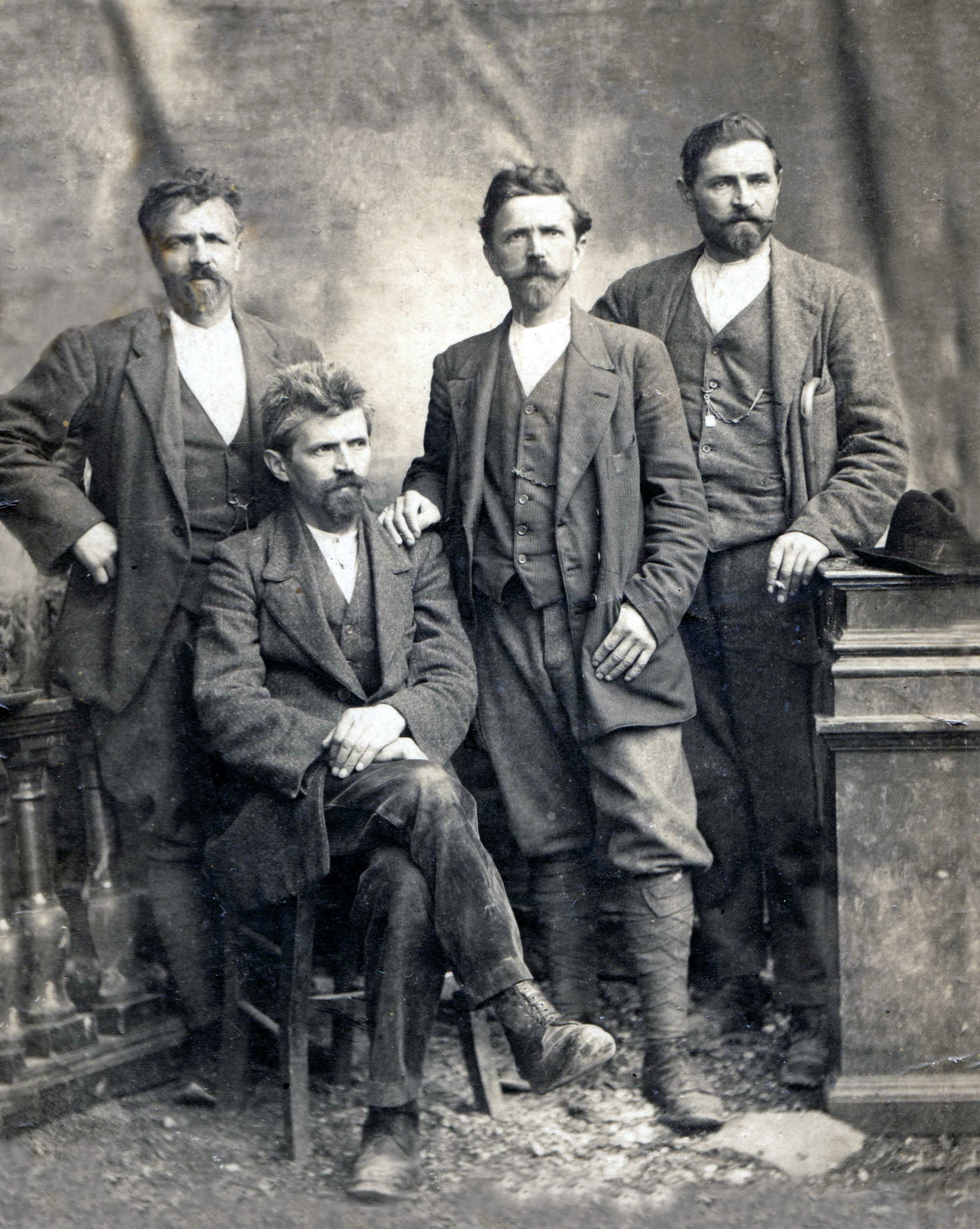 4 des 5 frères Cobai : Joseph (Giuseppe), Jean (Giovanni), Jacques (Giacomo) et Louis (Luigi) (de gauche à droite). Photo prise à Monteaperta (Italie) commune de Taipana, au lendemain de la Première Guerre mondiale.